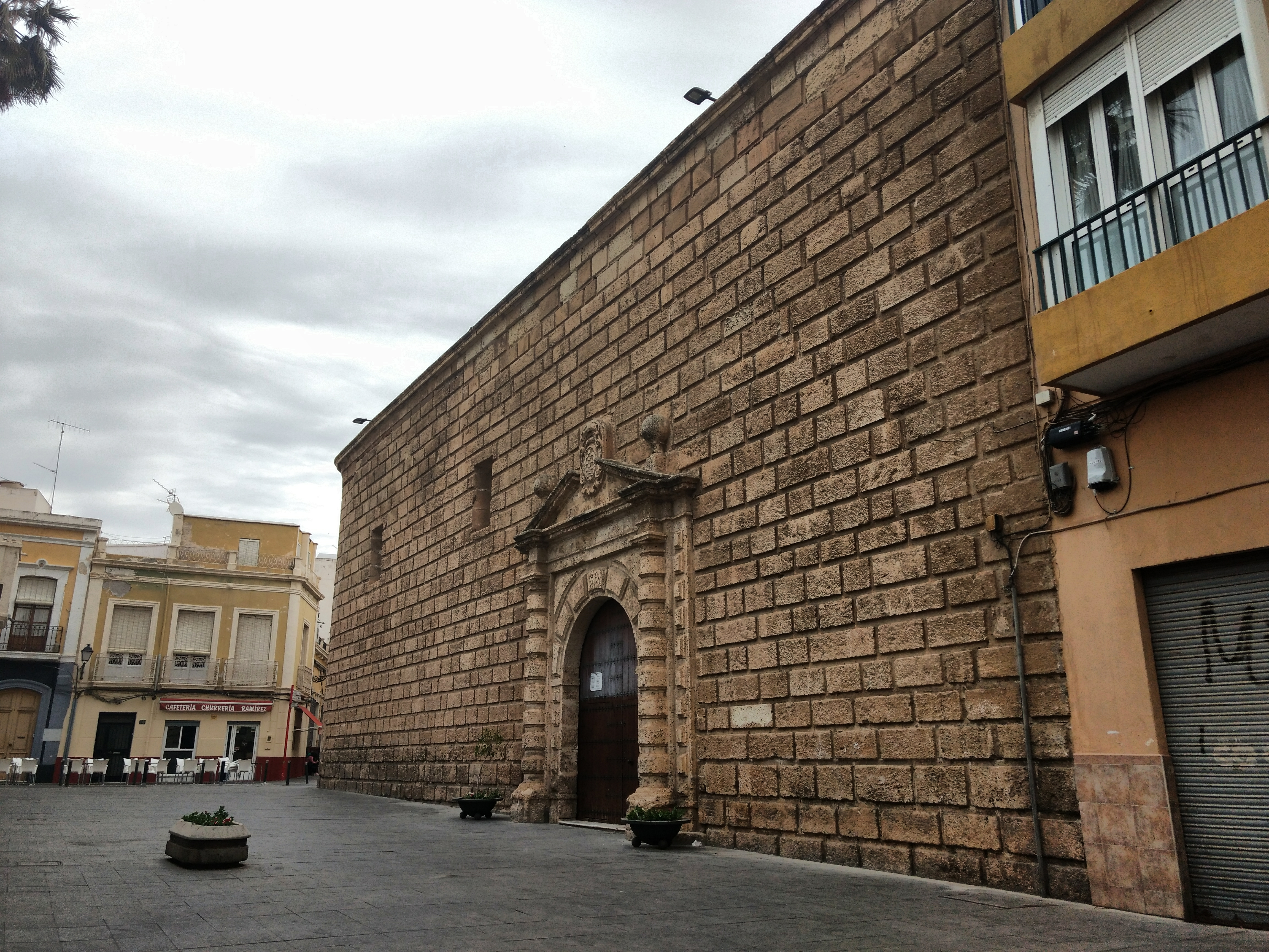 Iglesia de San Juan Evangelista (Almería)